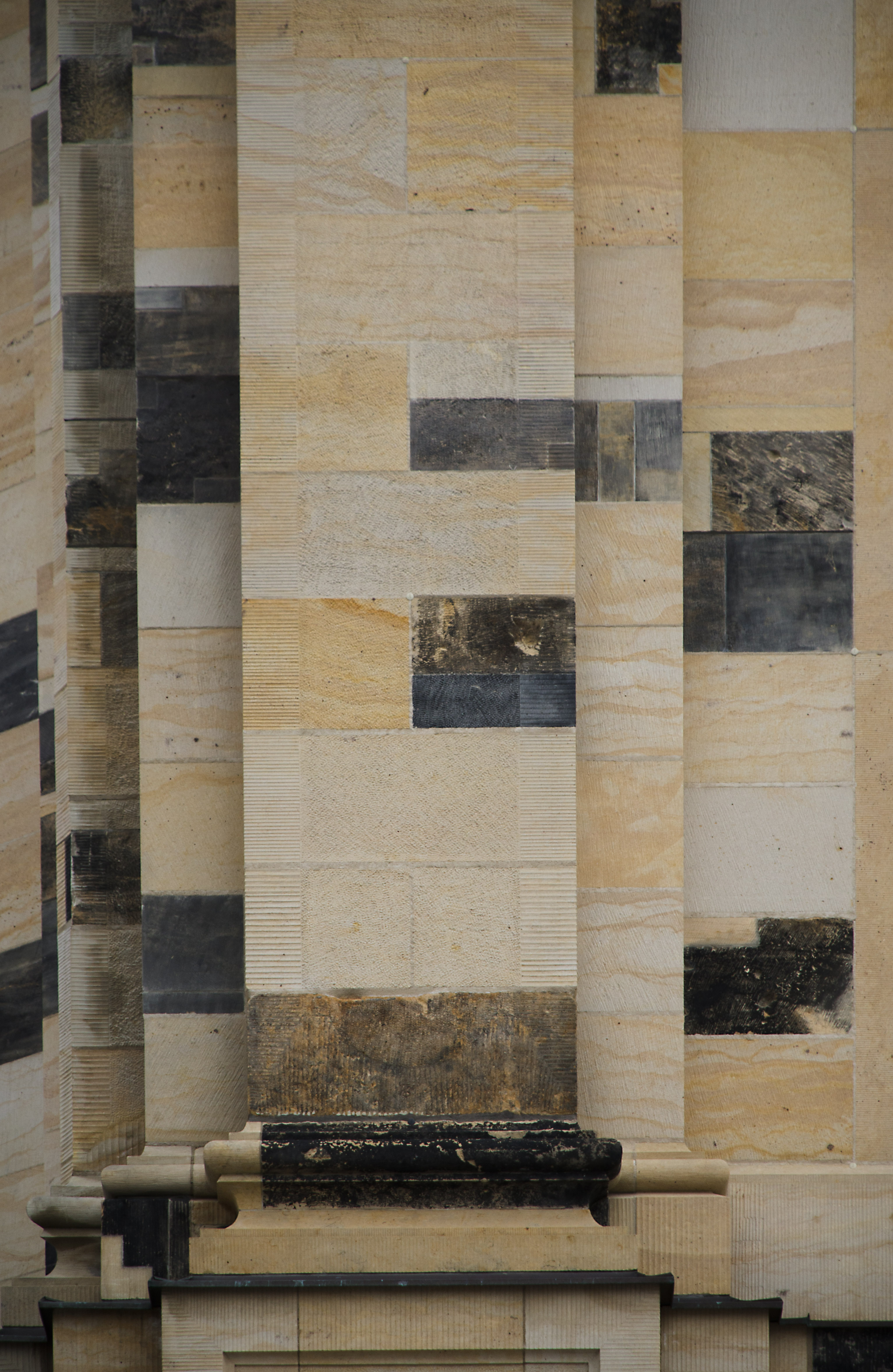 Alte und neue Steine an der Frauenkirche Dresden